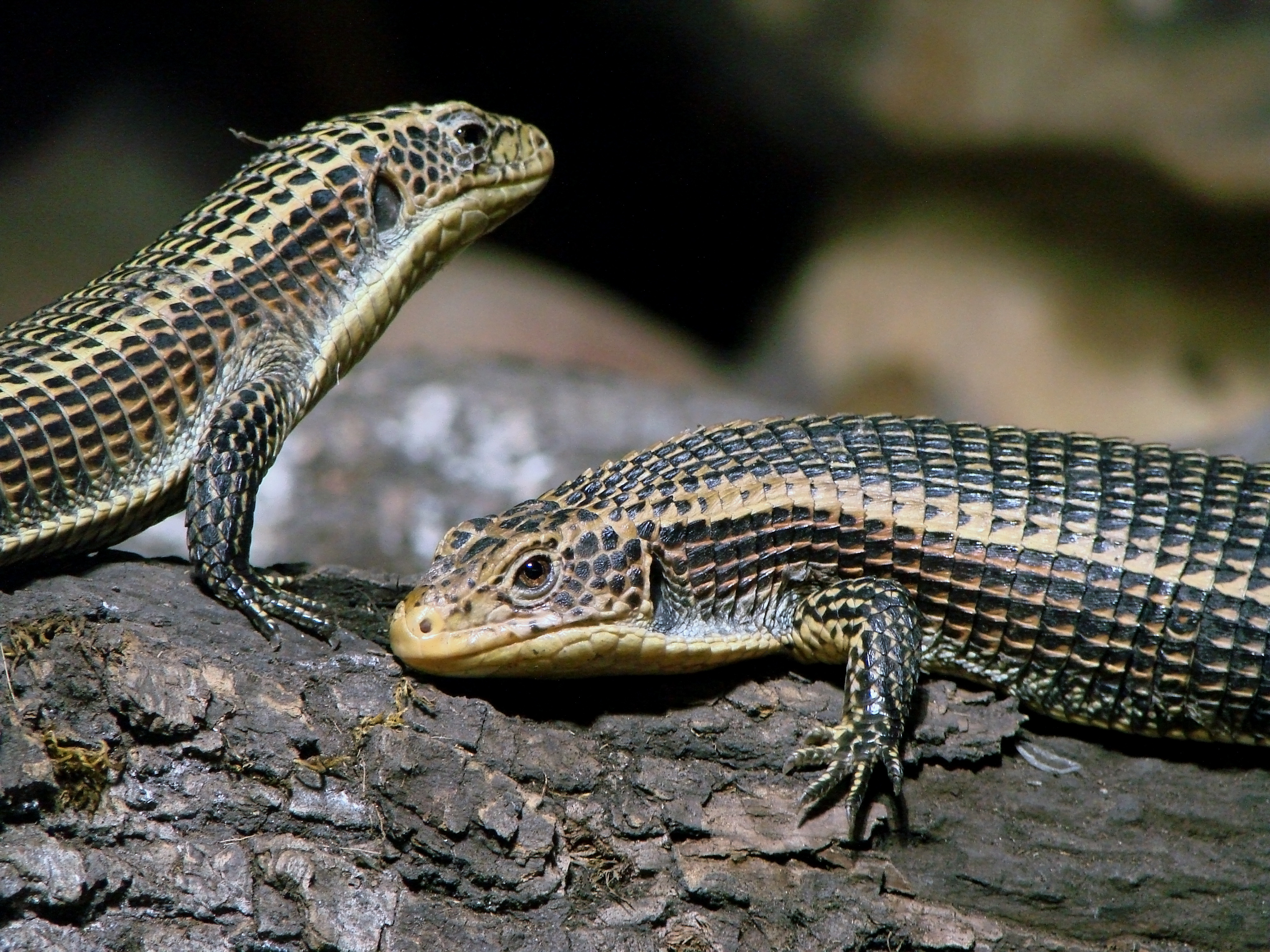 Lézards plaqués (Gerrhosaurus major), zoo d'Amnéville.